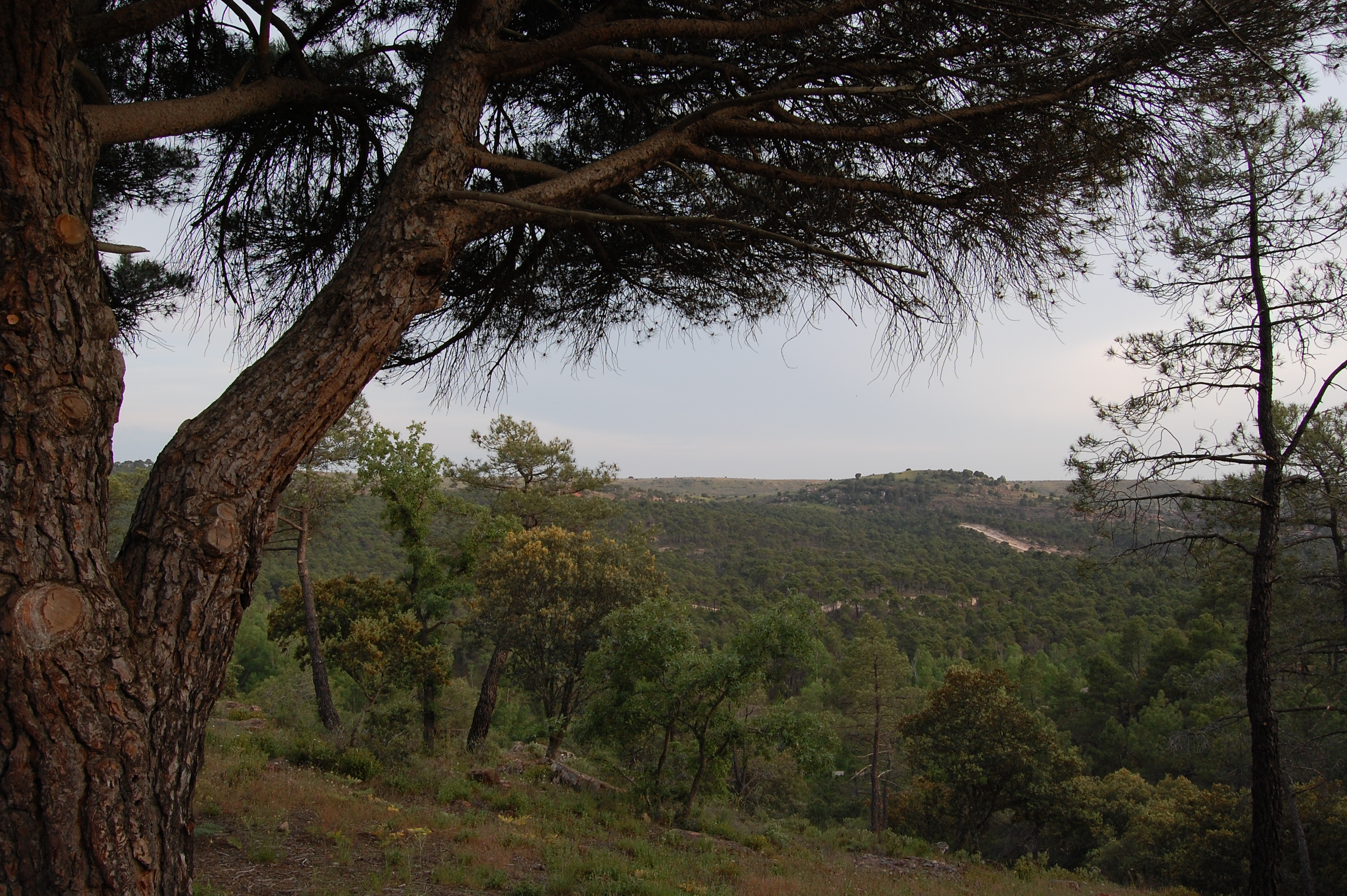 Pino Solitario